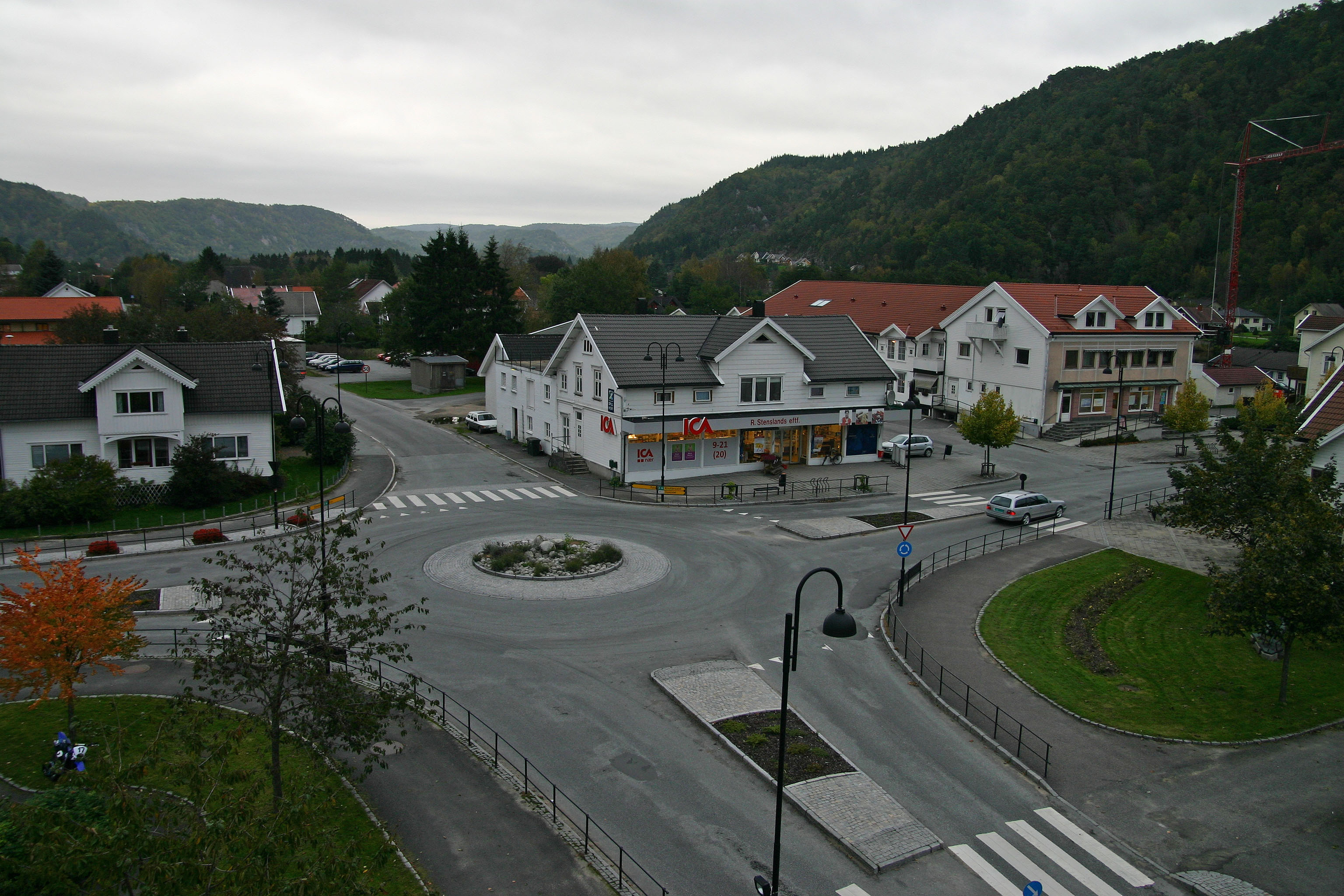 Vigeland sentrum i Lindesnes kommune, Vest-Agder